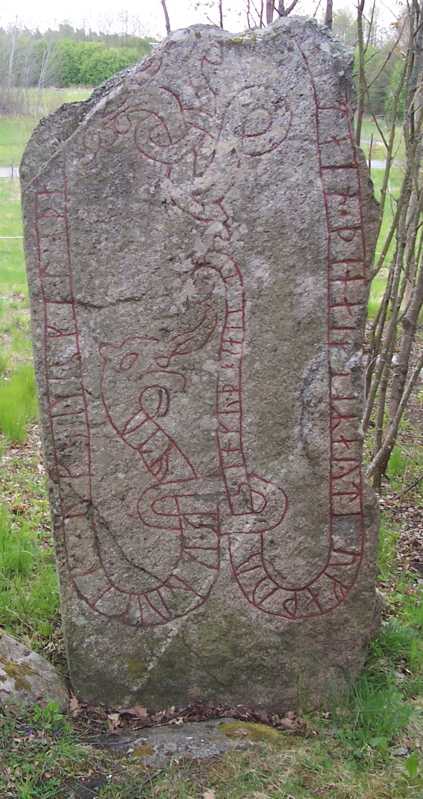 Upplands Runinskrift 22